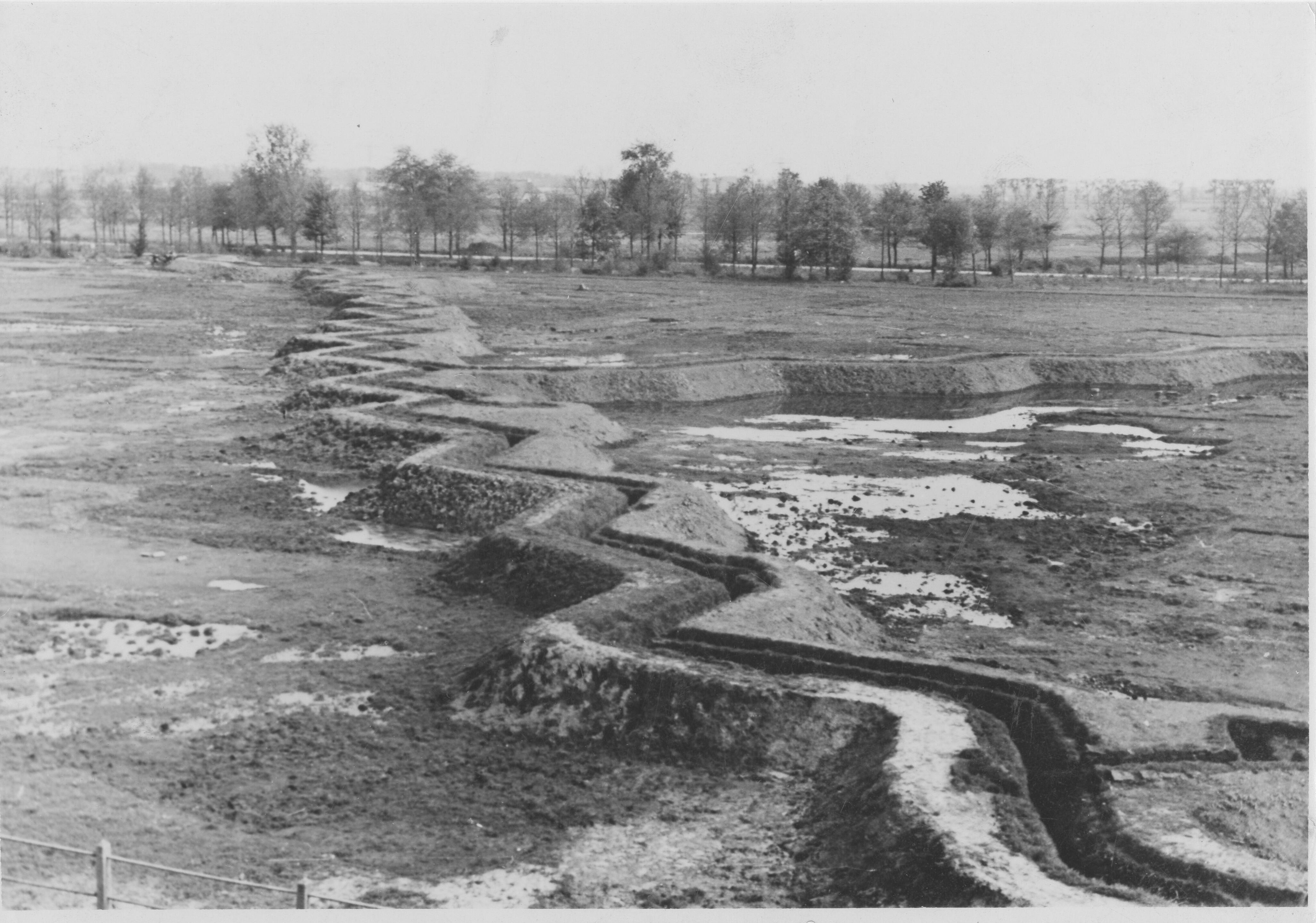 Duitse loopgravenlinie in het Stadspark ten tijde van de Bevrijding van Groningen